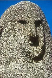 Filitosa